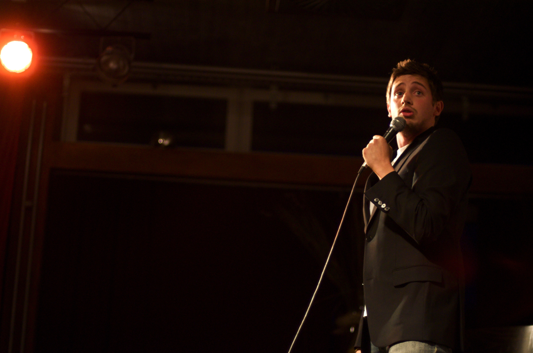 Komikaze at Carniola - Tin Vodopivec